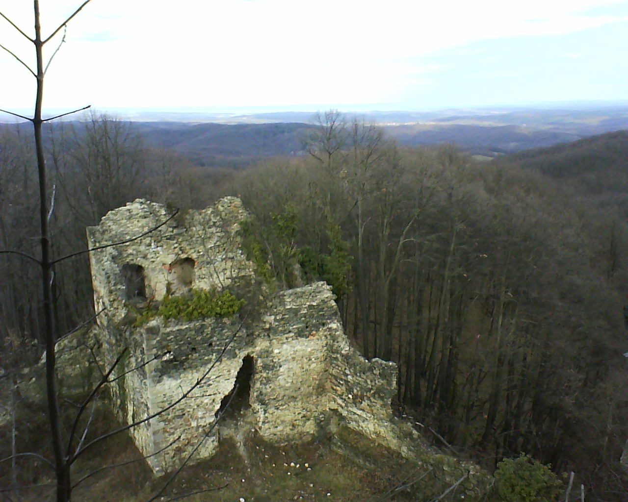 Stari grad Garić-grad